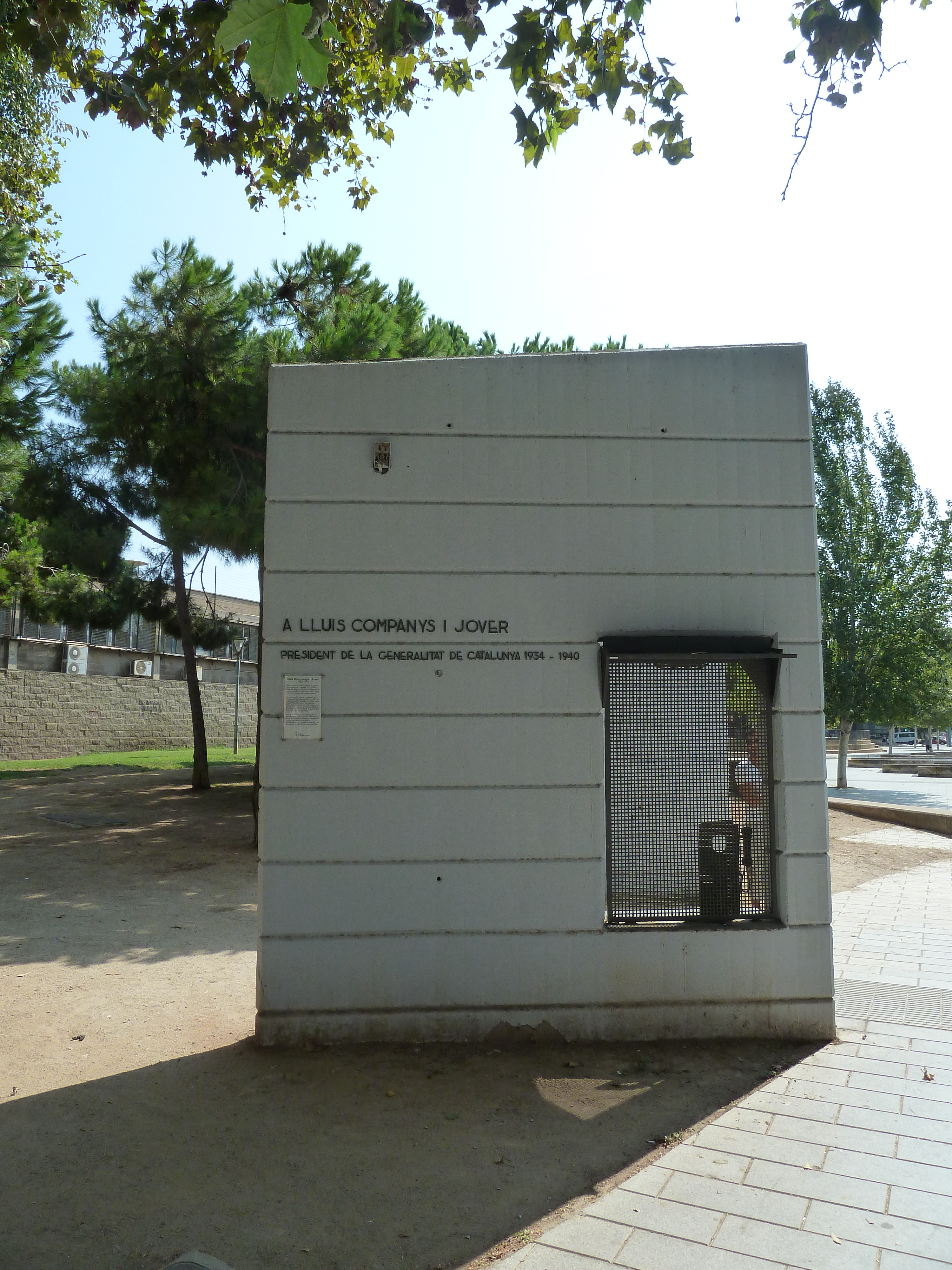 Sant Adrià de Besòs